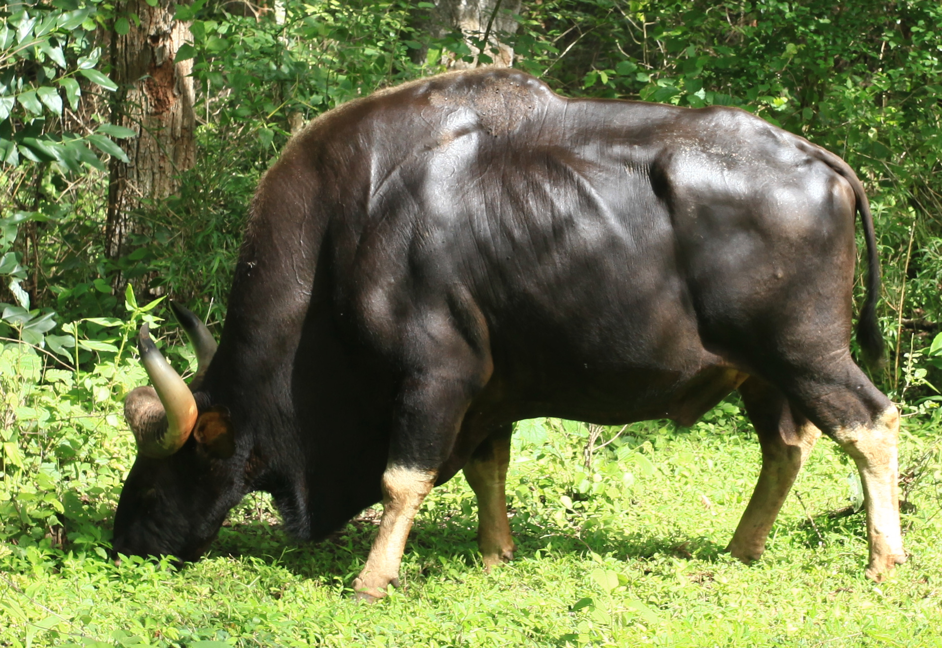 Indian bison or Gaur (Bos gaurus)